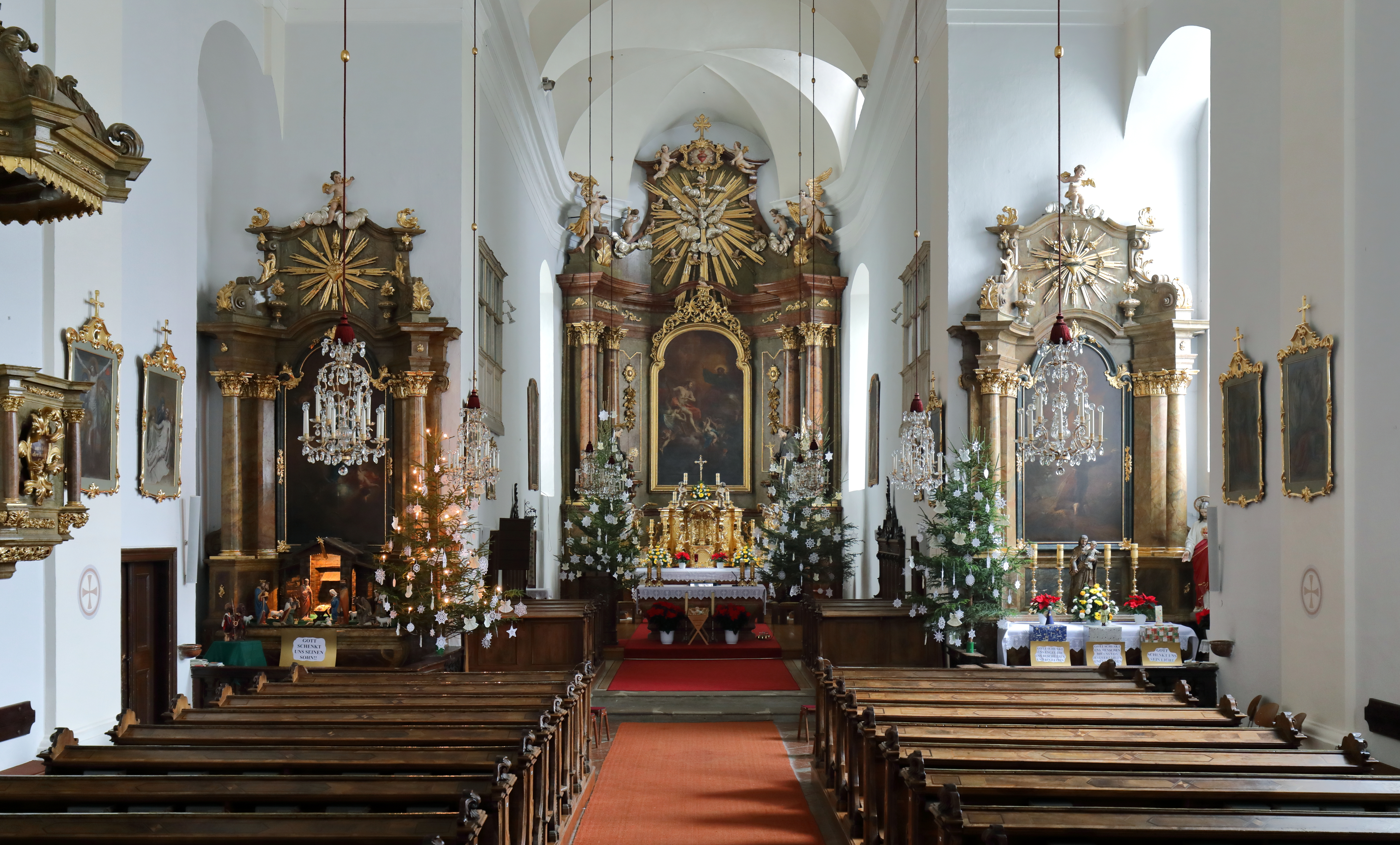 Innenansicht der röm.-kath. Pfarrkirche Allerheiligsten Dreifaltigkeit und ehemalige Franziskanerkirche in der niederösterreichischen Stadt Neulengbach. Ein frühbarocker Saalbau (1623-1627) mit lang gestrecktem eingezogenem und rund schließendem Chor sowie einer spätbarocken Einrichtung. Das Hochaltar- und die beiden Seitenaltarbilder schuf der Kremser Maler Martin Johann Schmidt 1768.